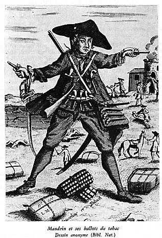 Gravure d'époque - domaine public